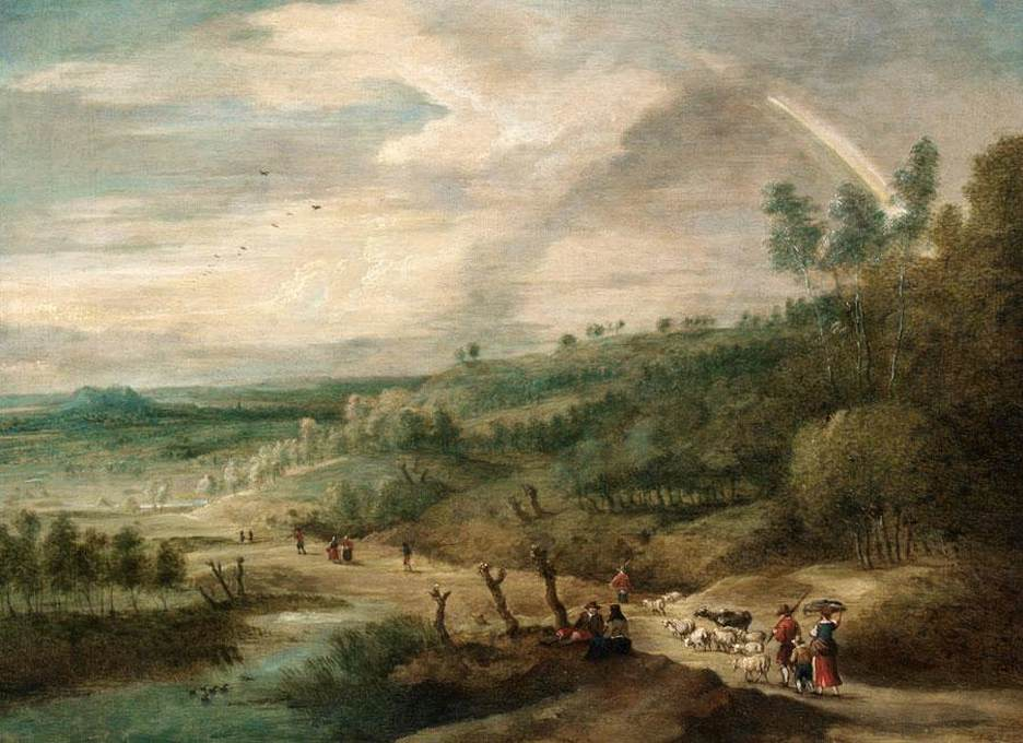 Extensive Landscape